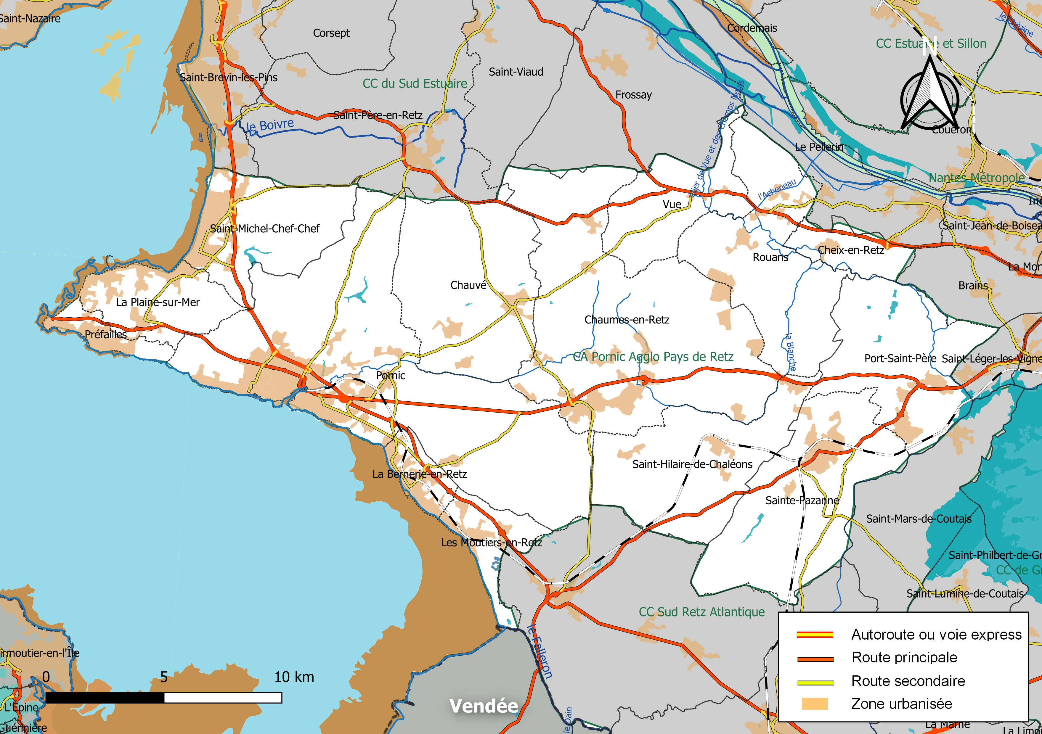 Carte géographique de l'intercommunalité Pornic Agglo Pays de Retz, département de la Loire-Atlantique, France. Composition au 1er janvier 2019.